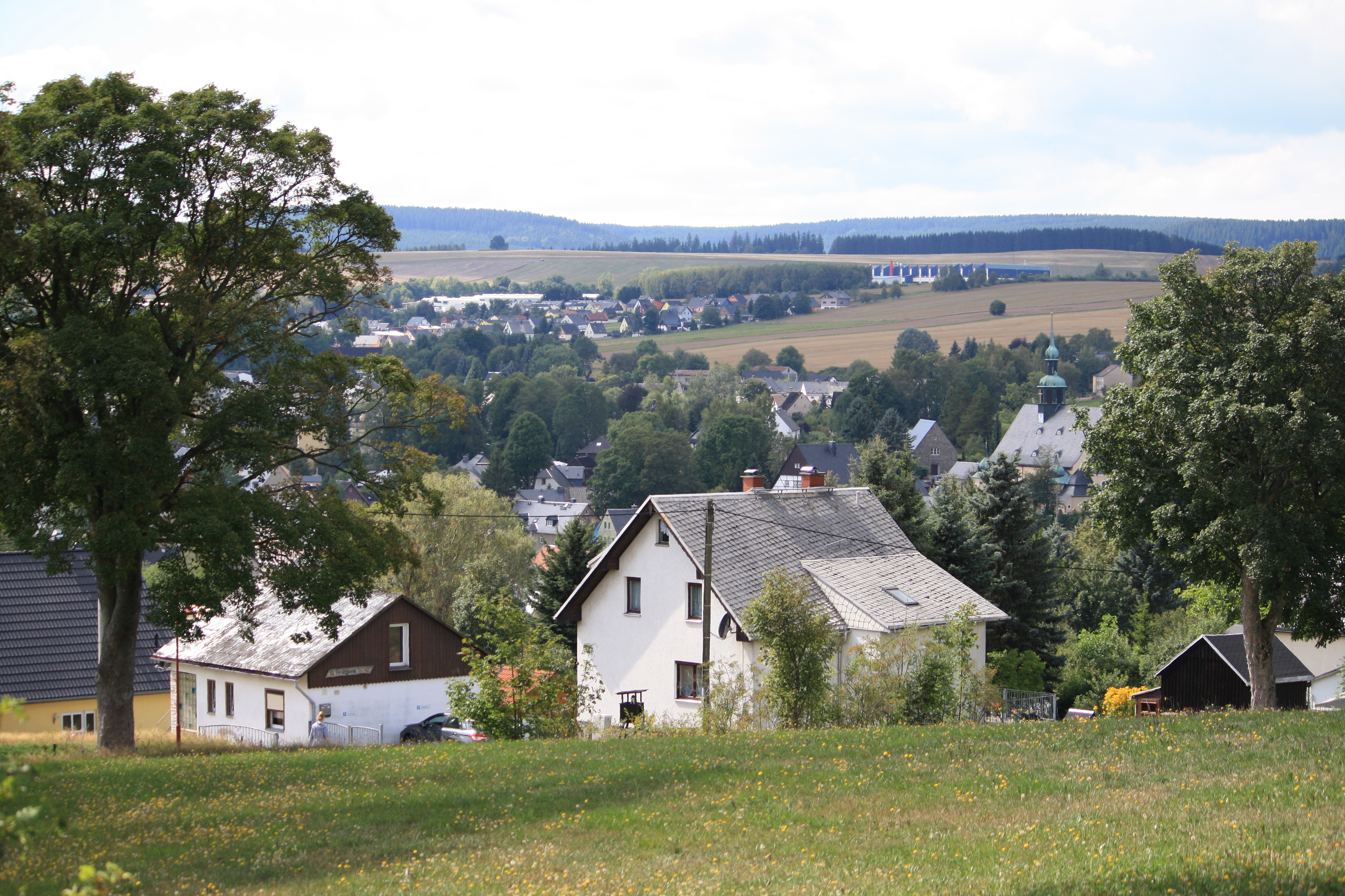 Crottendorf overzicht